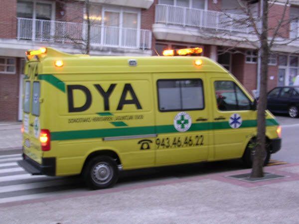 Ambulancia de DYA Gipuzkoa Donostiako DYAren anbulantzia.